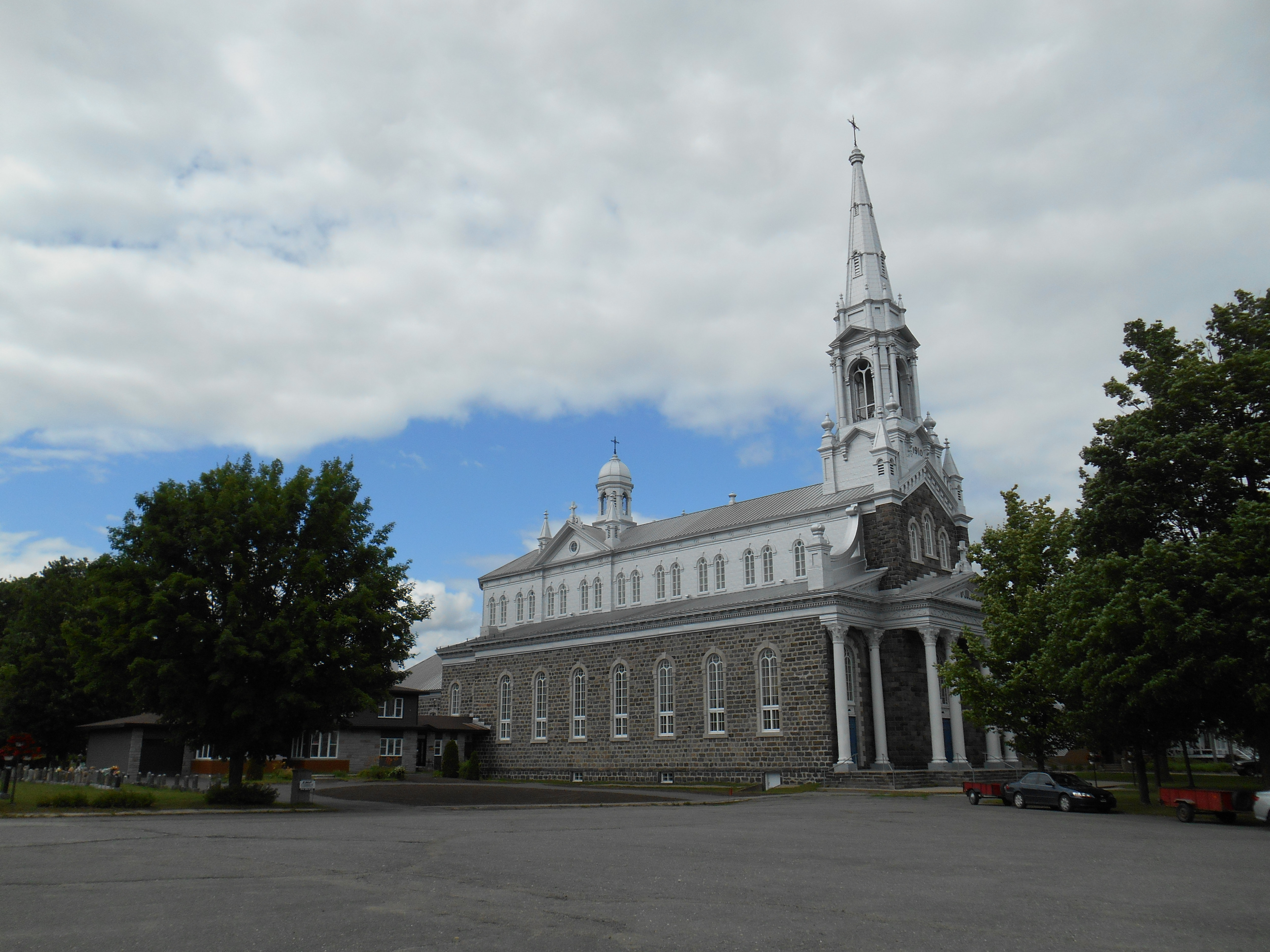 Église Sainte-Julie-de-Laurierville, 145, rue Grenier, Laurierville, Québec